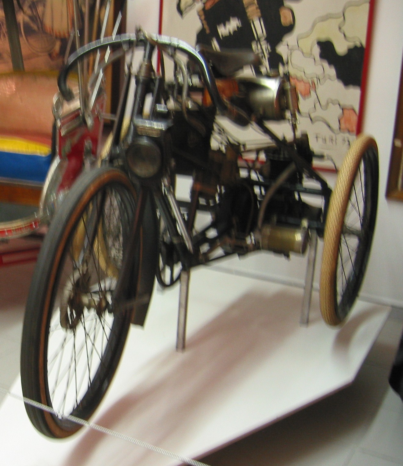 Phébus Tricycle von 1900 in einem Museum